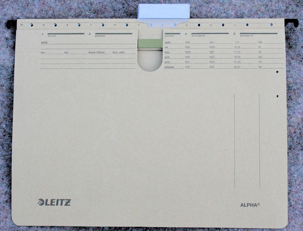 Hängehefter